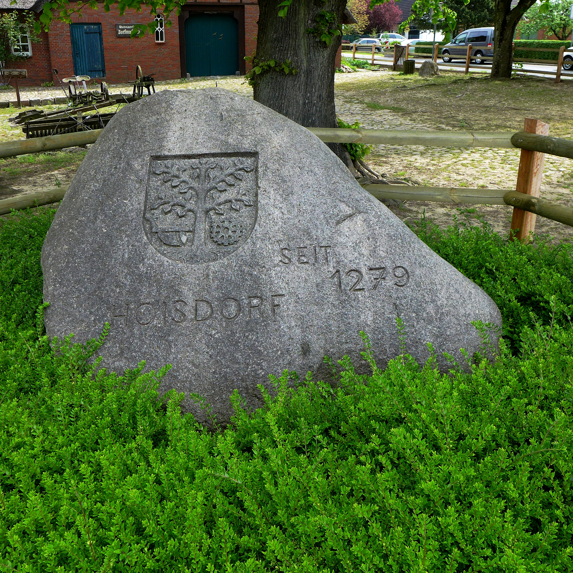 Findling mit Dorfwappen vor dem Stormarnschen Dorfmuseum Hoisdorf. Aufnahmedatum 2015-05.